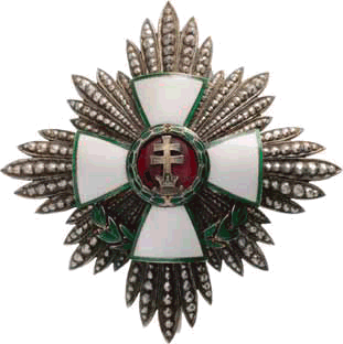 Magyar Érdemkereszt hadidíszítményes középkeresztje a csillaggal